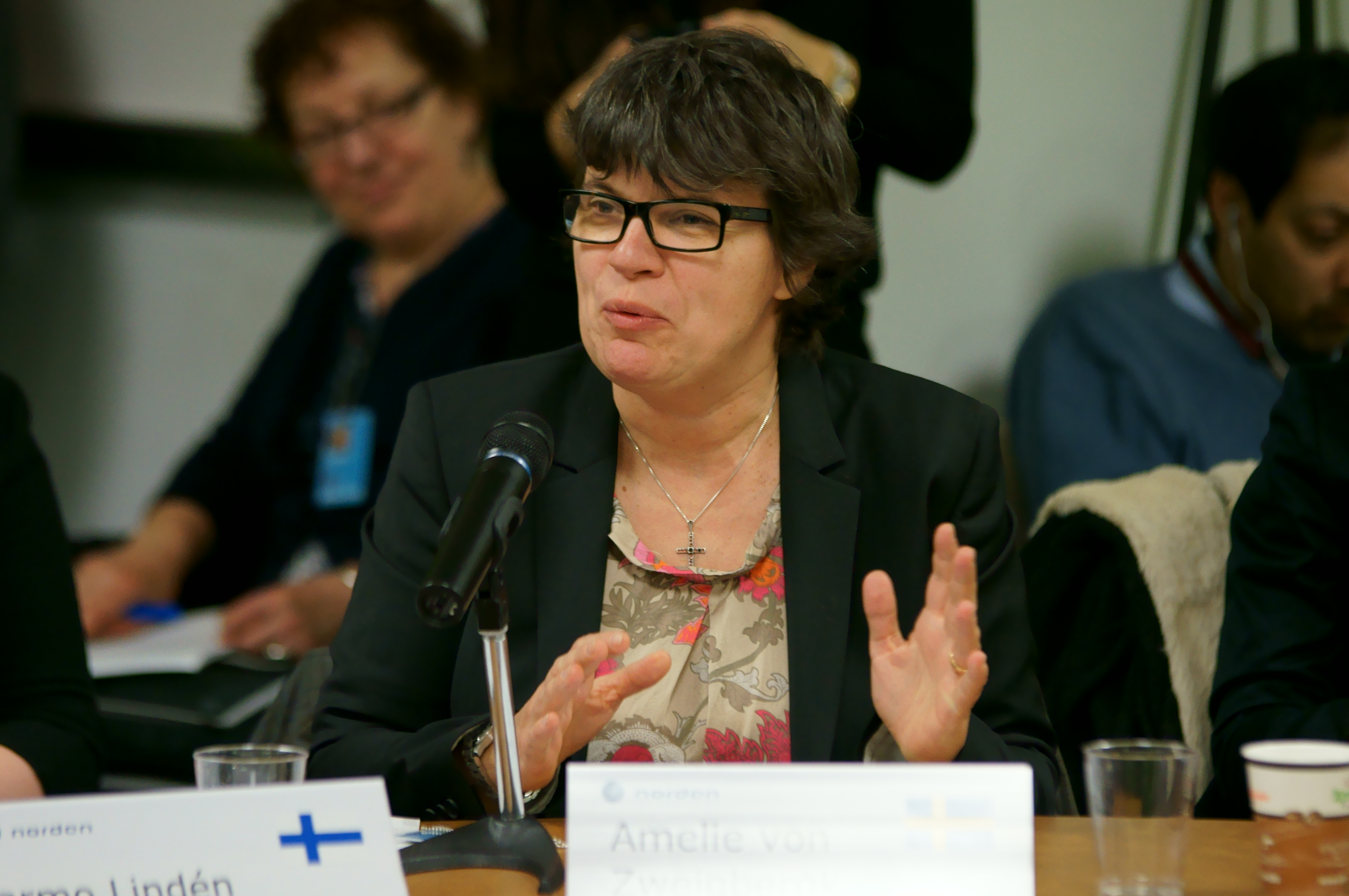 Den svenske statssekretæren under et nordisk side-event i FN under FNs kvinnekommisjons sesjon (CSW56) 2012.